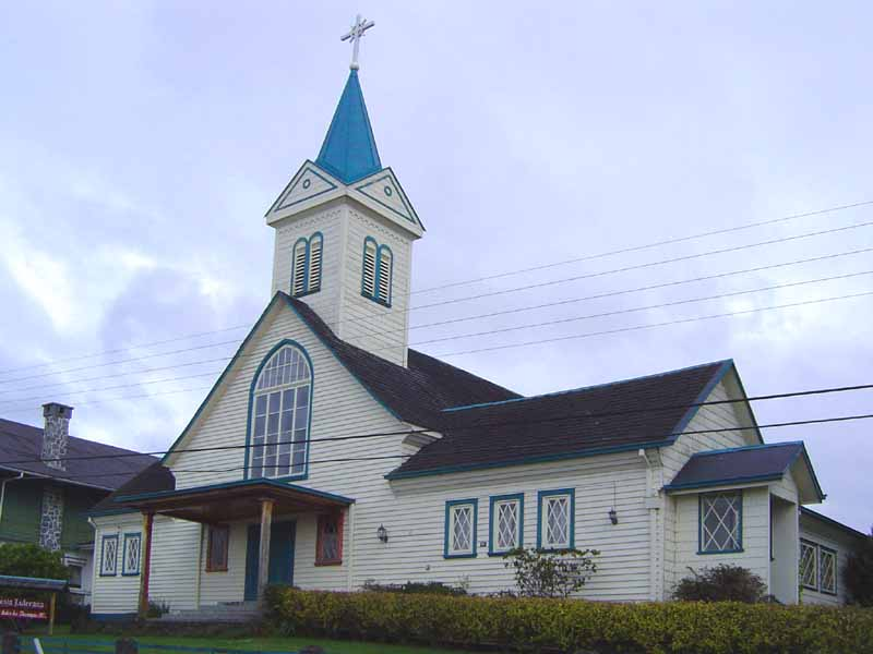 Kirche in Frutillar, der "deutscheste" Ort am Lago Llanquihue Sonstiges: ...